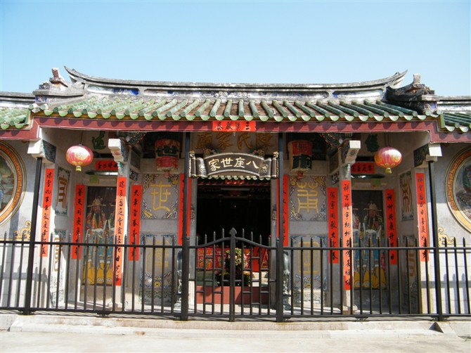 赤港陈氏家庙——八座世家 2010.2.23